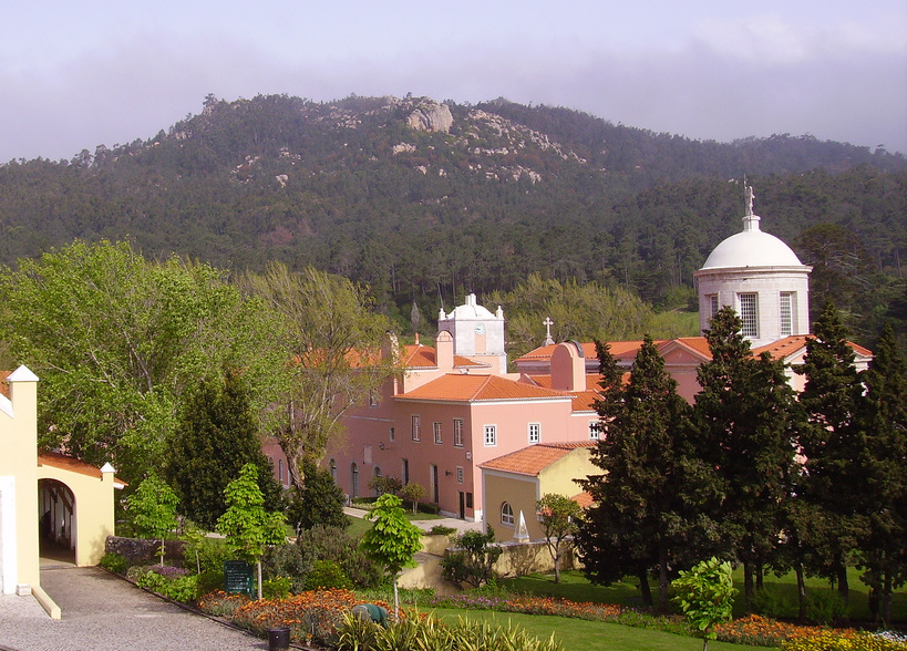 superbe endroit pour se détendre et jouer au golf près d' Estoril au Portugal very green